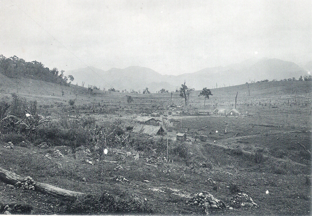 埔里大坪頂現在的主要耕作作物是菜頭等夏季蔬菜與百香果為大宗，這裡有一望無際的美麗的山坡地形，可媲美北海道的富良野，百年前原屬於「埔里社製糖會社」於明治43(1910)年申請的農場開墾地，開始砍除滿山的森林栽種甘蔗以製糖。大正2年(1913)「台灣糖業株式會社」(今稱台糖公司)併購埔里社製糖會社後，從此成為台灣糖業株式會社埔里製糖所的「太平頂農場」。 這張由林志明醫師提供「埔里社農場太平頂開墾地」，屬於埔里糖業發展歷史珍貴的老影像，原出自臺灣製糖株式會社於大正4年(1915)出版的《創立十五週年記念》寫真帖，影像附有說明，大意為「埔里社大平頂開墾地全景大觀，遠方平野滿是蔗園，中央蓋有幾間「藁小屋」(茅草屋)做為勞働者的休憩所，休憩所前可見載甘蔗的台車鐵道行駛其間」。 圖：感謝林志明醫師提供